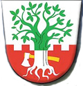 Česky: znak obce Buk